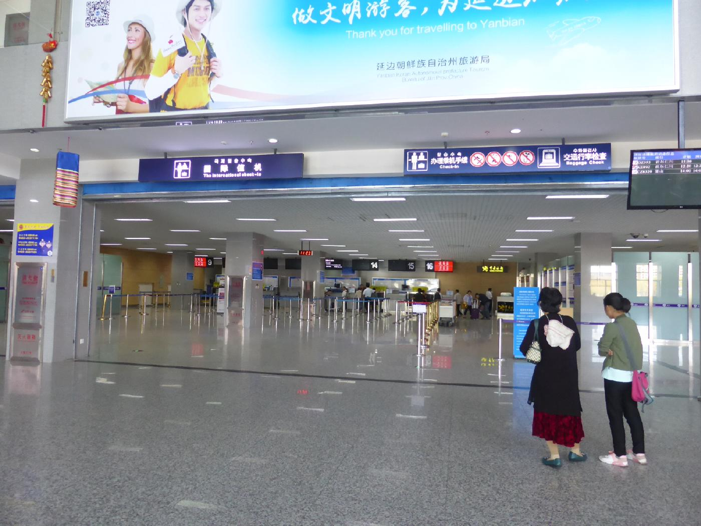 国際線チケットカウンター